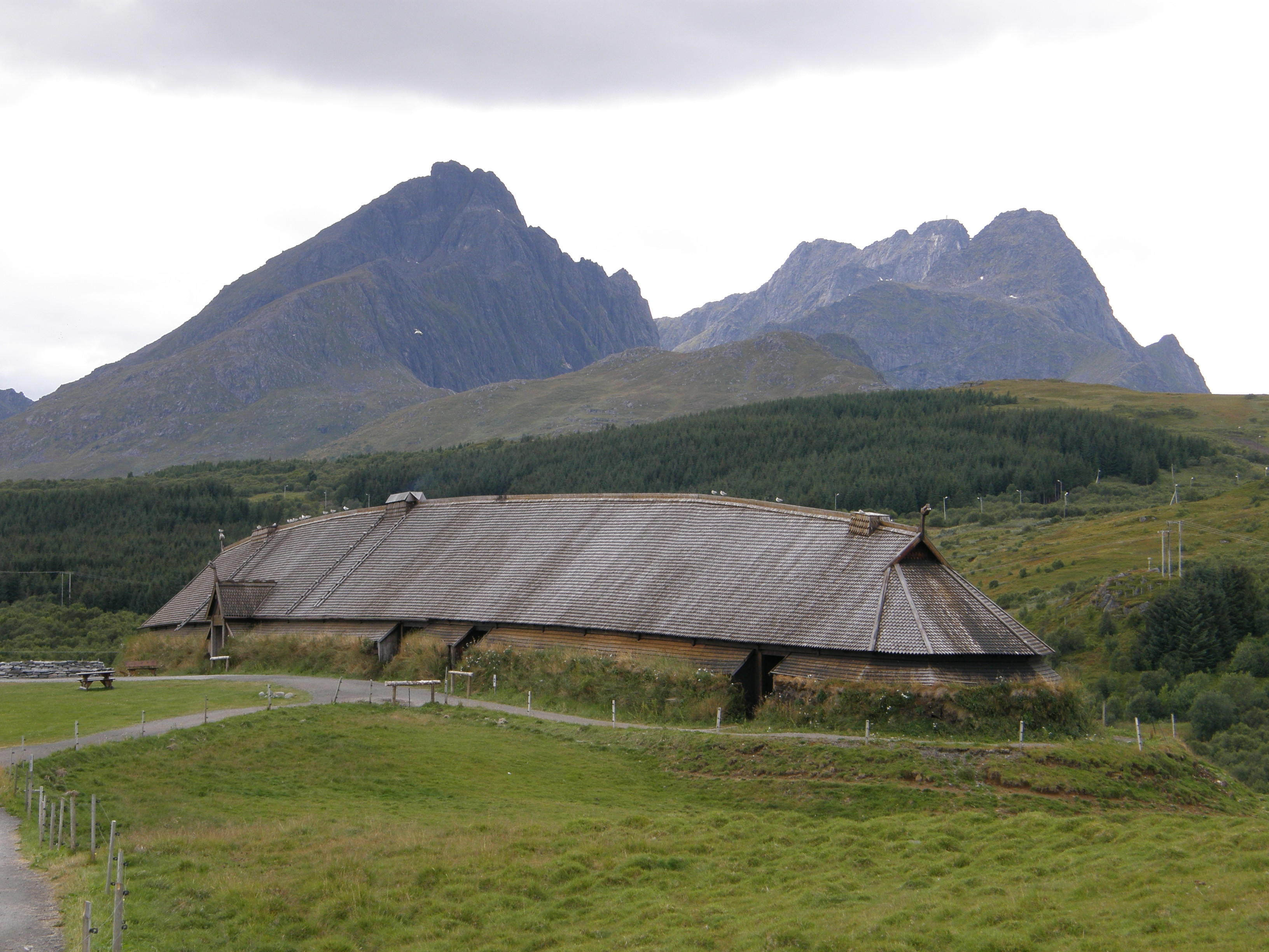 Viking longhouse - Borg